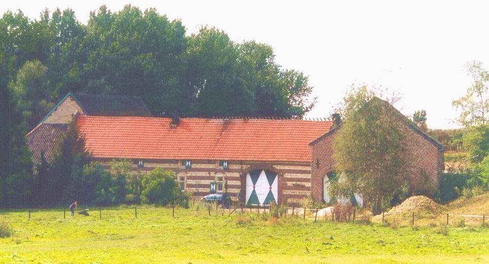 eigen foto